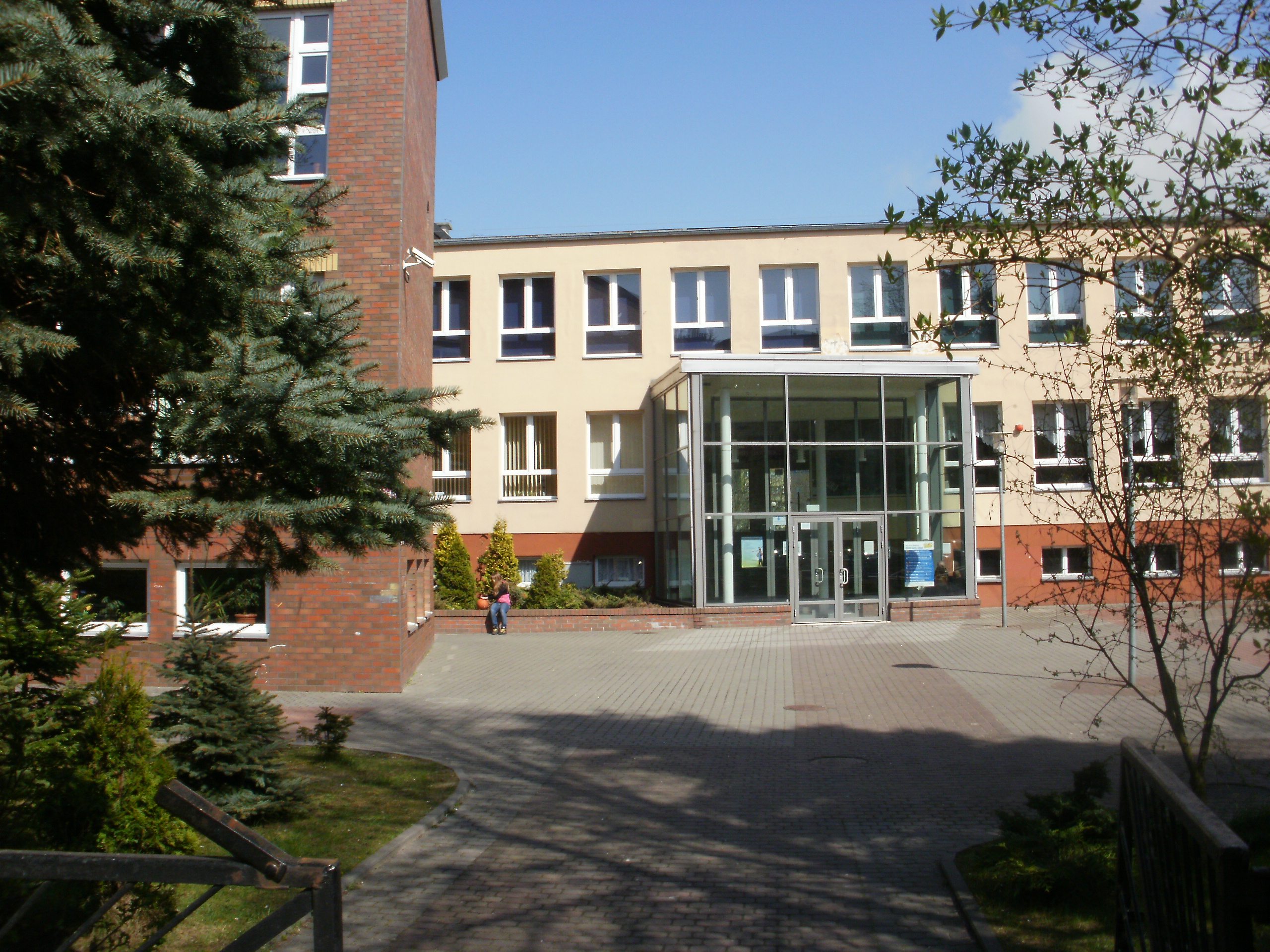 Ustka, ul. Wróblewskiego- szkoła